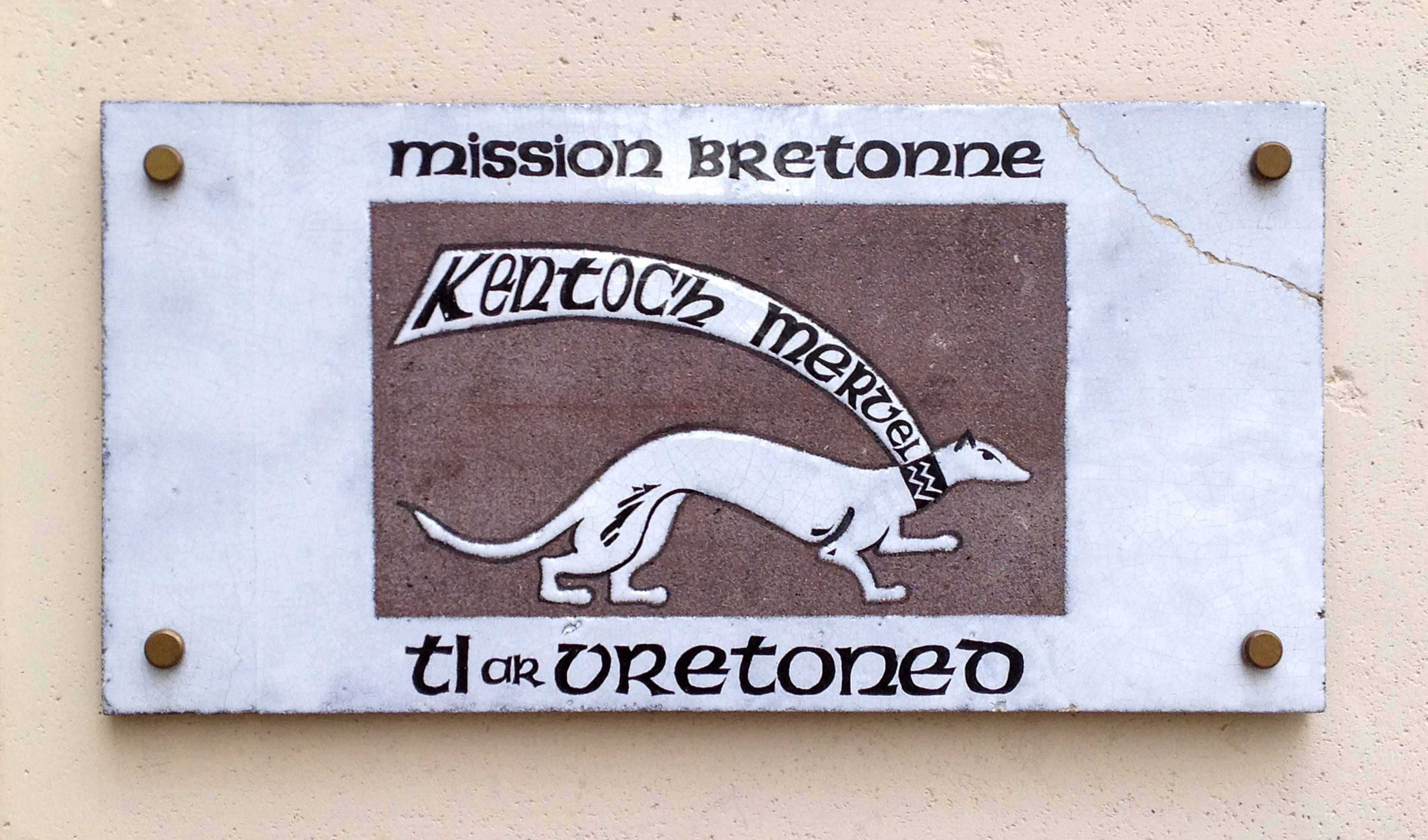 Plaque de la Mission bretonne - Ti ar Vretoned, au 22 de la Rue Delambre, dans le 14e arrondissement de Paris (France).